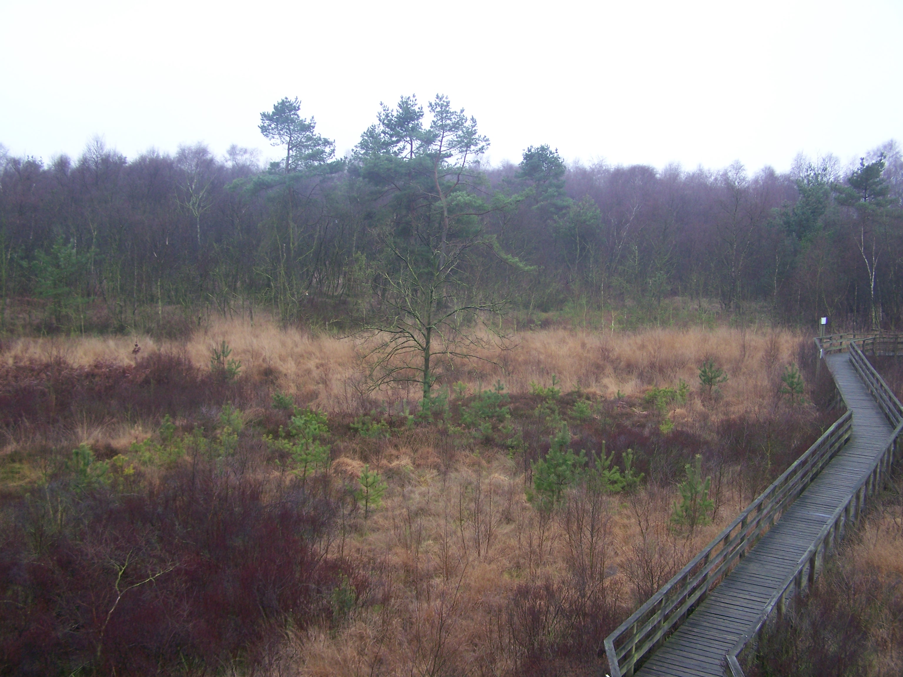 Blick vom Aussichtsturm in die Speller Dose (Naturschutzgebiet)